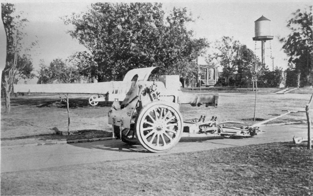 Photograph showing French Canon de 155 Long modèle 1917 Schneider, in firing position. See also : Image:155mm Schneider Gun Modele 1917 Travelling Position.jpeg Image:155mm Schneider Gun Modele 1917 Carriage in Travelling Position.jpeg Image:155mm Schneider Gun Modele 1917 Placing on Carriage.jpeg